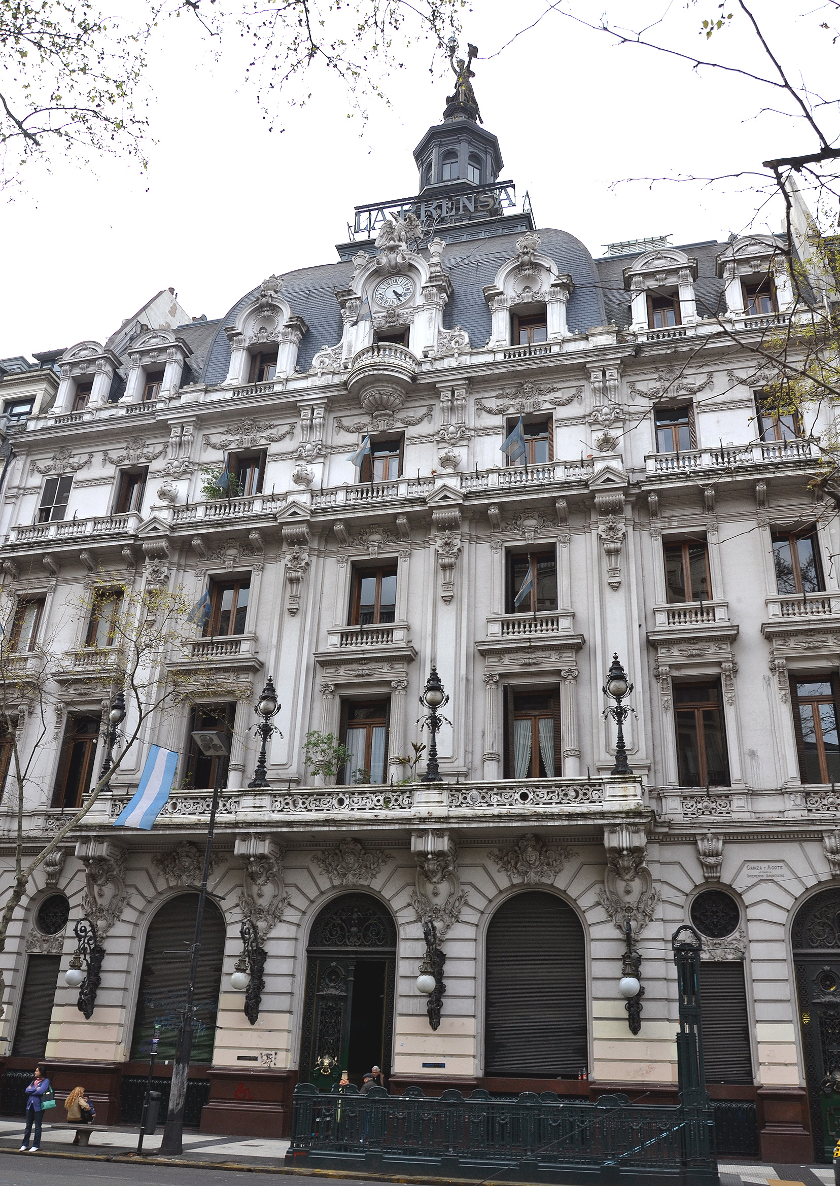 Diario La Prensa